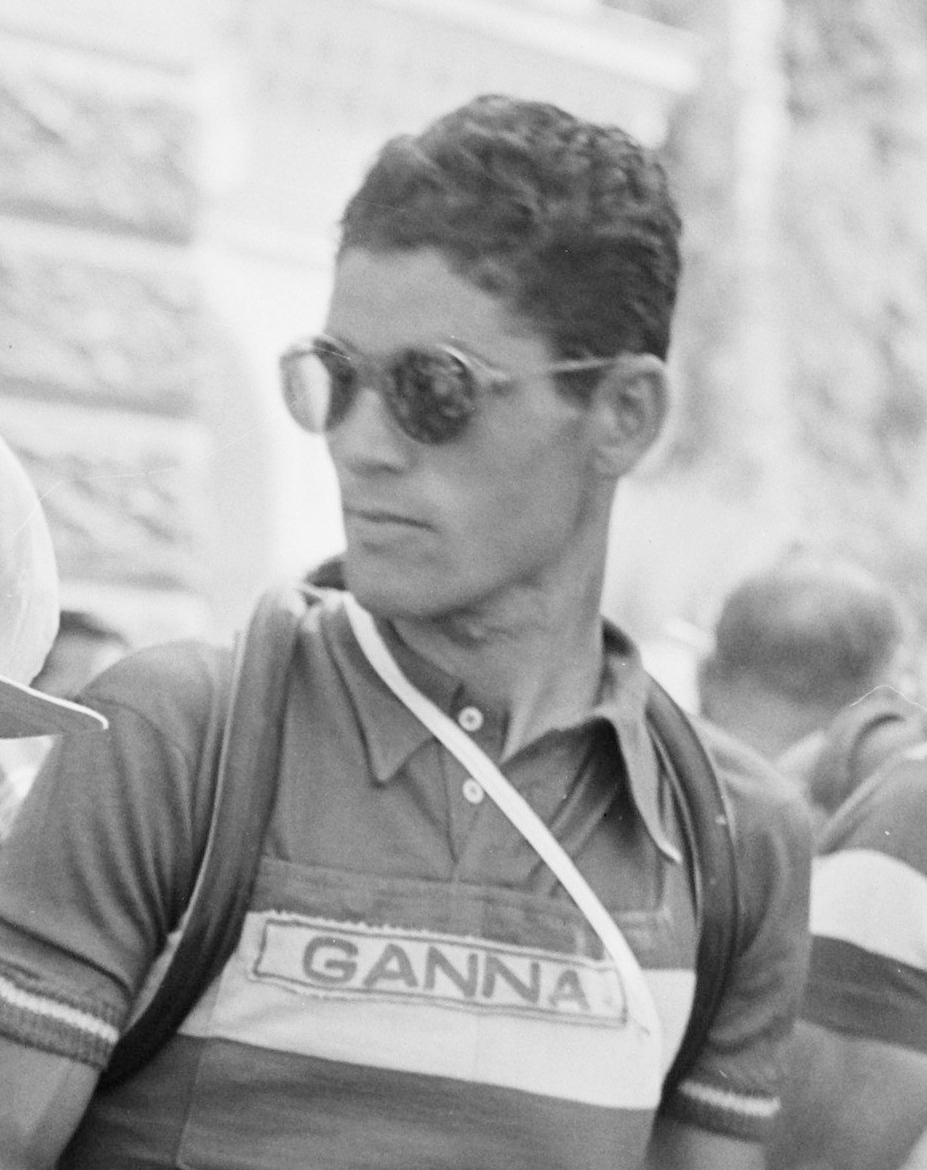 Nationaal Archief Beschrijving: Mario Baroni Datum: 18 juli 1952 Bestanddeelnummer 905-2267 Vervaardiger: Anefo/ Presser URL: Voor meer informatie over het Nationaal Archief: Voor meer foto's uit deze en andere collecties, bezoek onze Beeldbank:, U kunt ons helpen onze kennis van de fotocollecties te verrijken door tags en commentaren toe te voegen. Herkent u mensen of locaties of heeft u een bijzonder verhaal te vertellen bij één van de foto's, laat dan een reactie achter (als u ingelogd bent bij Flickr) of stuur een mailtje naar